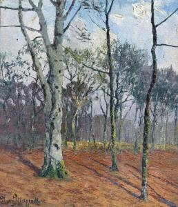 Franz Pflugradt Bussiner Revier (Velgast)